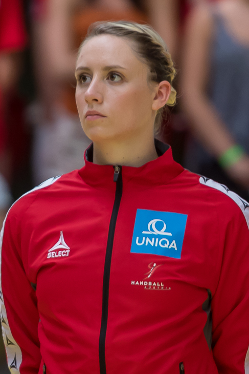 Damenhandball WM-Qualifikation Playoff Österreich vs Rumänien am 13. Juni 2017 in Stockerau. Bild zeigt Johanna Schindler (AUT).